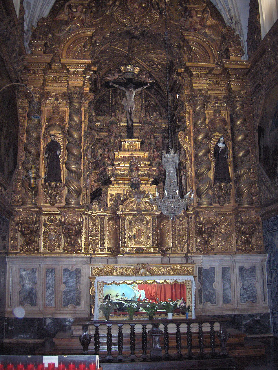 Side altar in talha dourada with funerary monument for Teresa of Ávila; Igreja de São Francisco, Évora, Portugal